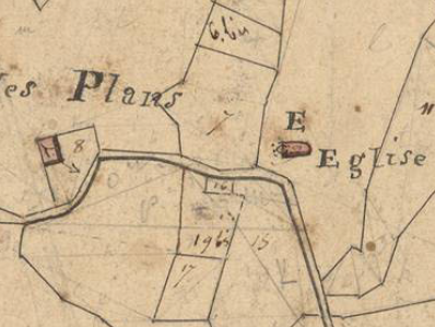 Els Plans en el Cadastre napoleònic del 1812 (Arxius Departamentals dels Pirineus Orientals)